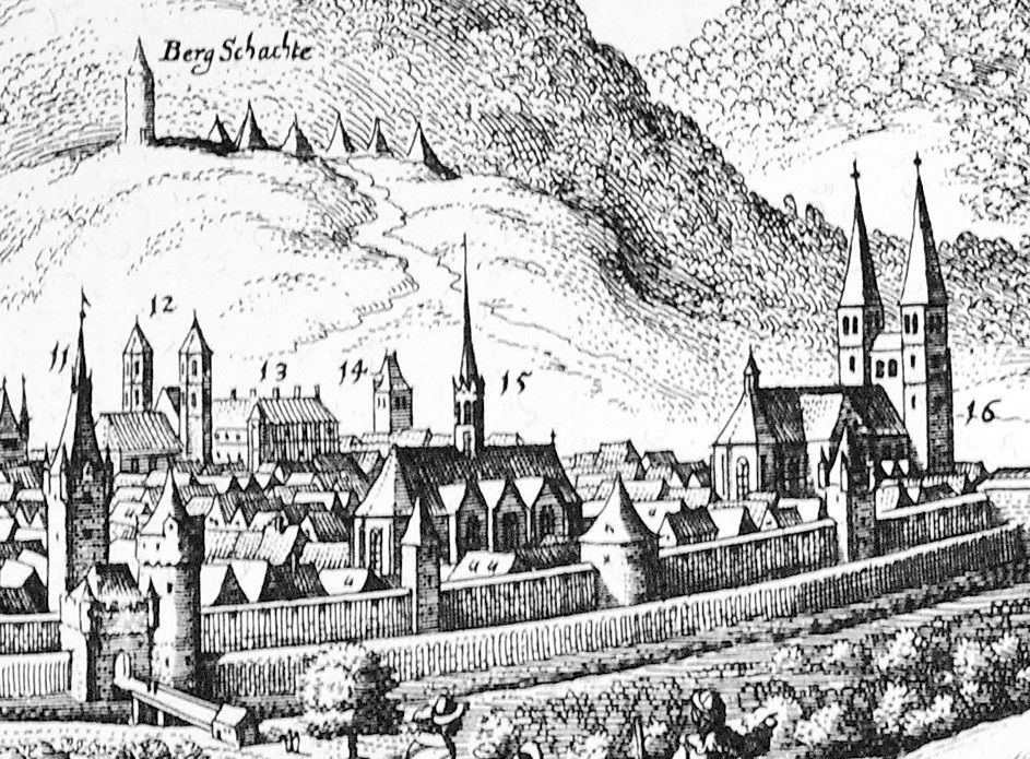 Merian (1653), Stadtansicht Goslar, Ausschnitt: Franziskanerkirche (15, die Brüdern kirch) zwischen Viti-Tor (11) und Frankenberger Kirche (16). Von der Kirche sind keine baulichen Reste vorhanden.